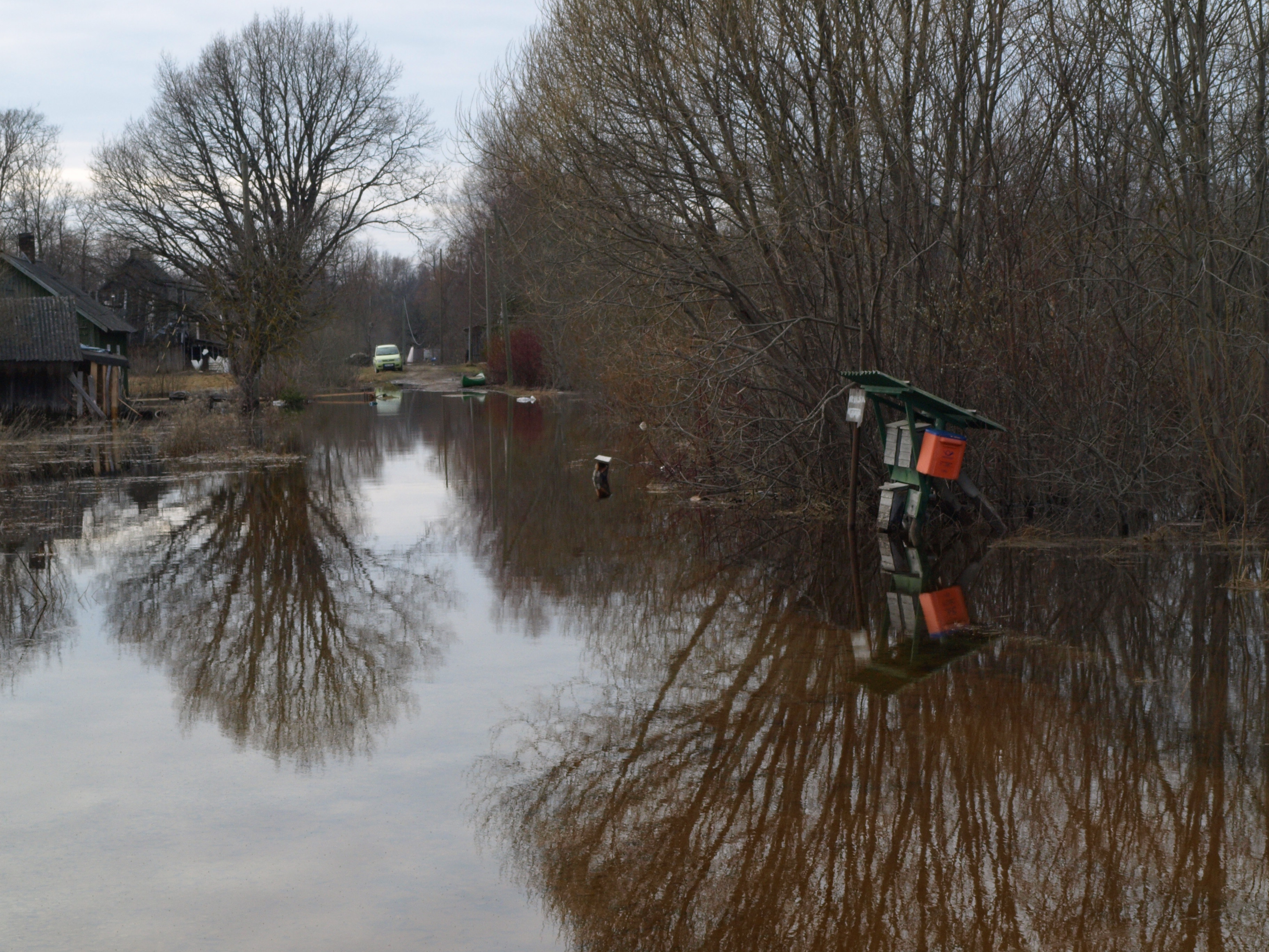 Suurvesi Soomaal